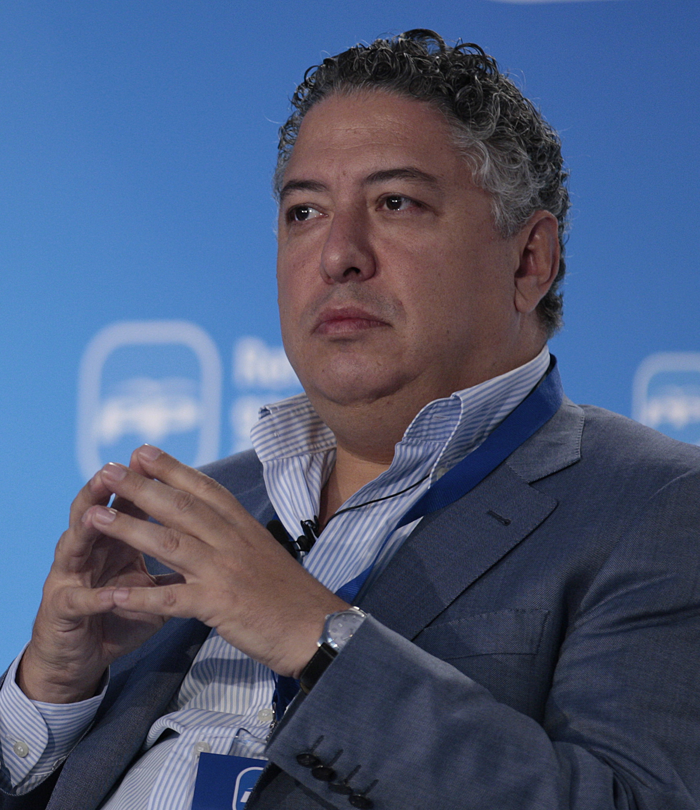 TOMÁS BURGOS